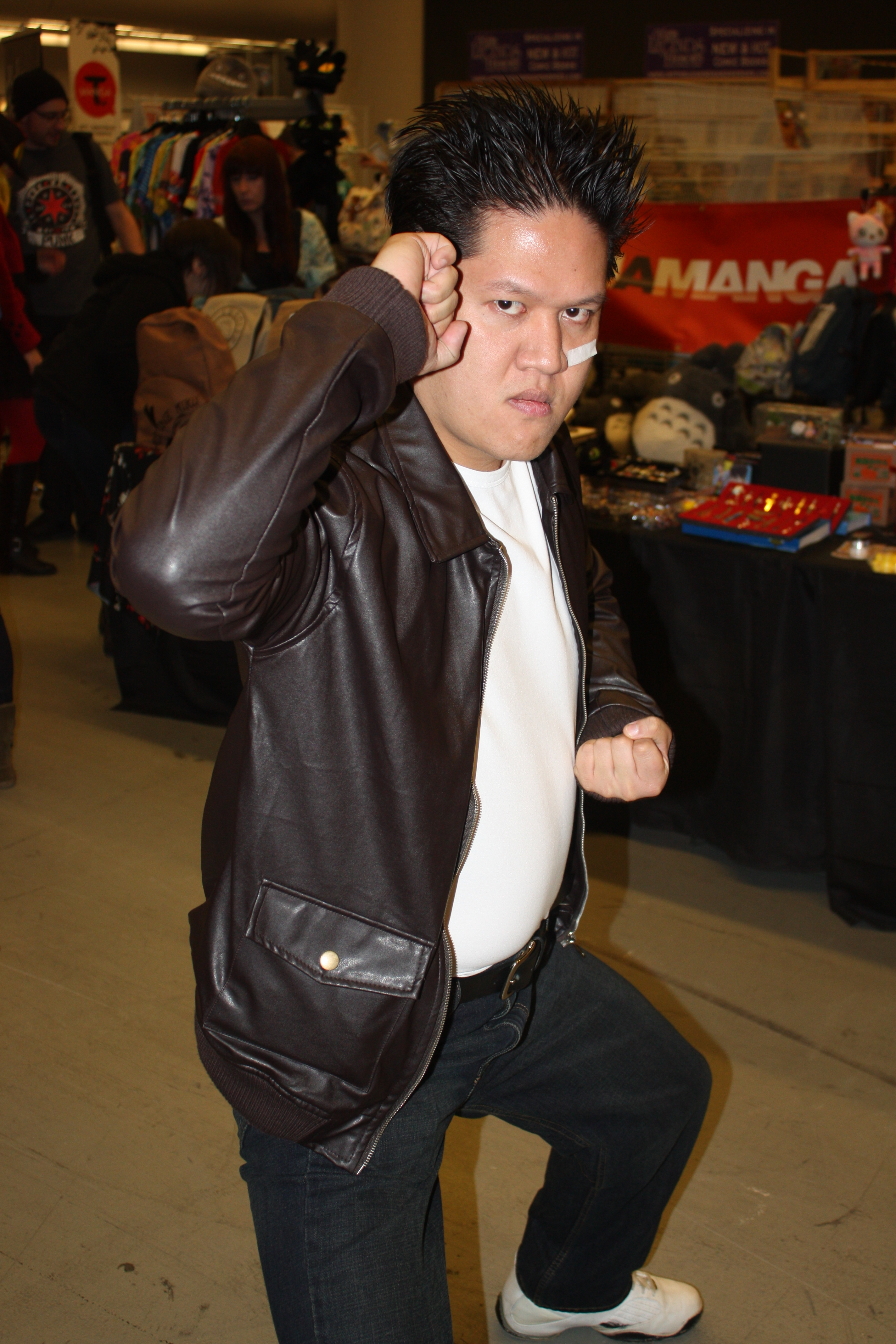 Montreal Mini-Comiccon 2014: Ryo Hazuki（芭月涼）